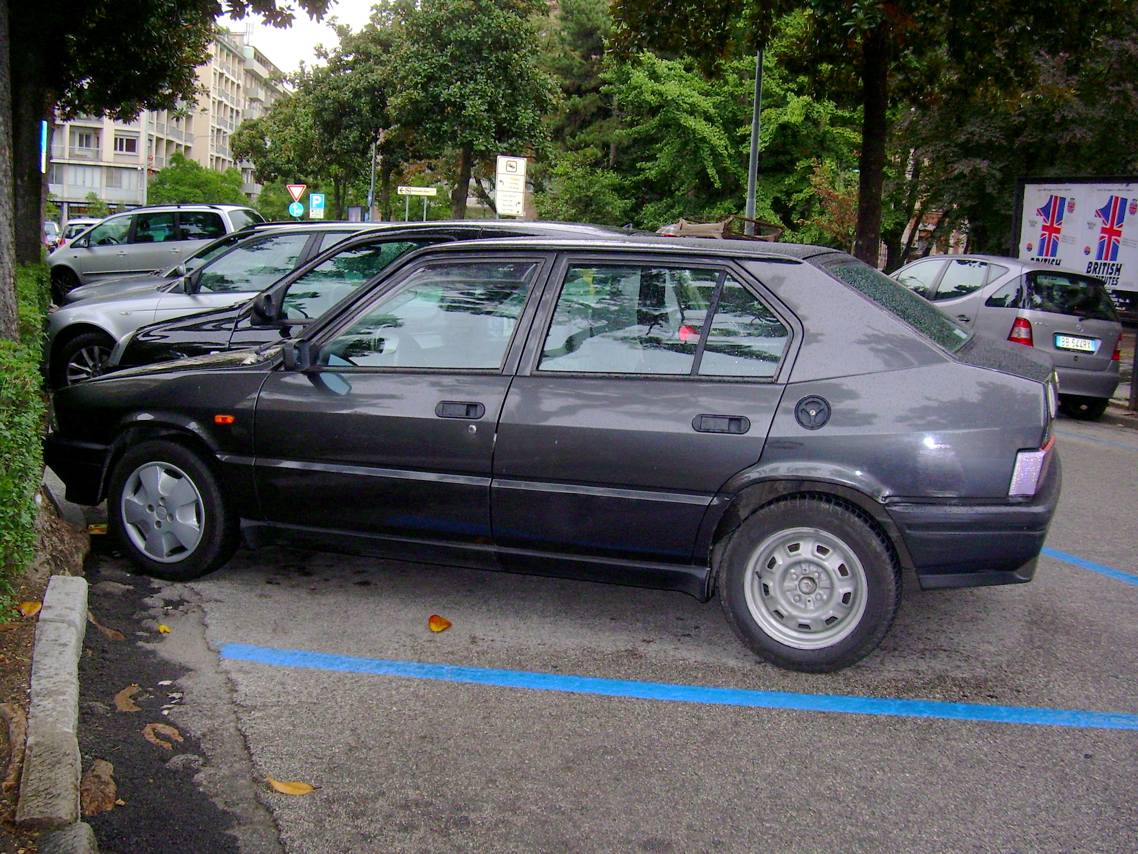 Autore:Powering Licenza: Una Alfa 33